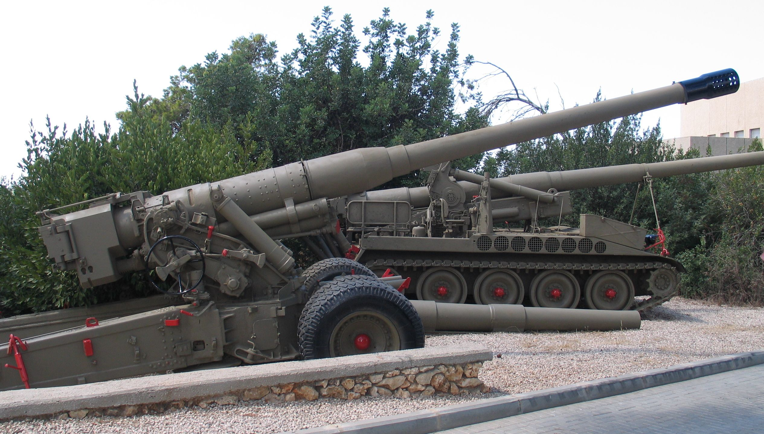 Soviet S-23 180 mm gun in Beyt ha-Totchan, Zichron Yaakov, Israel.